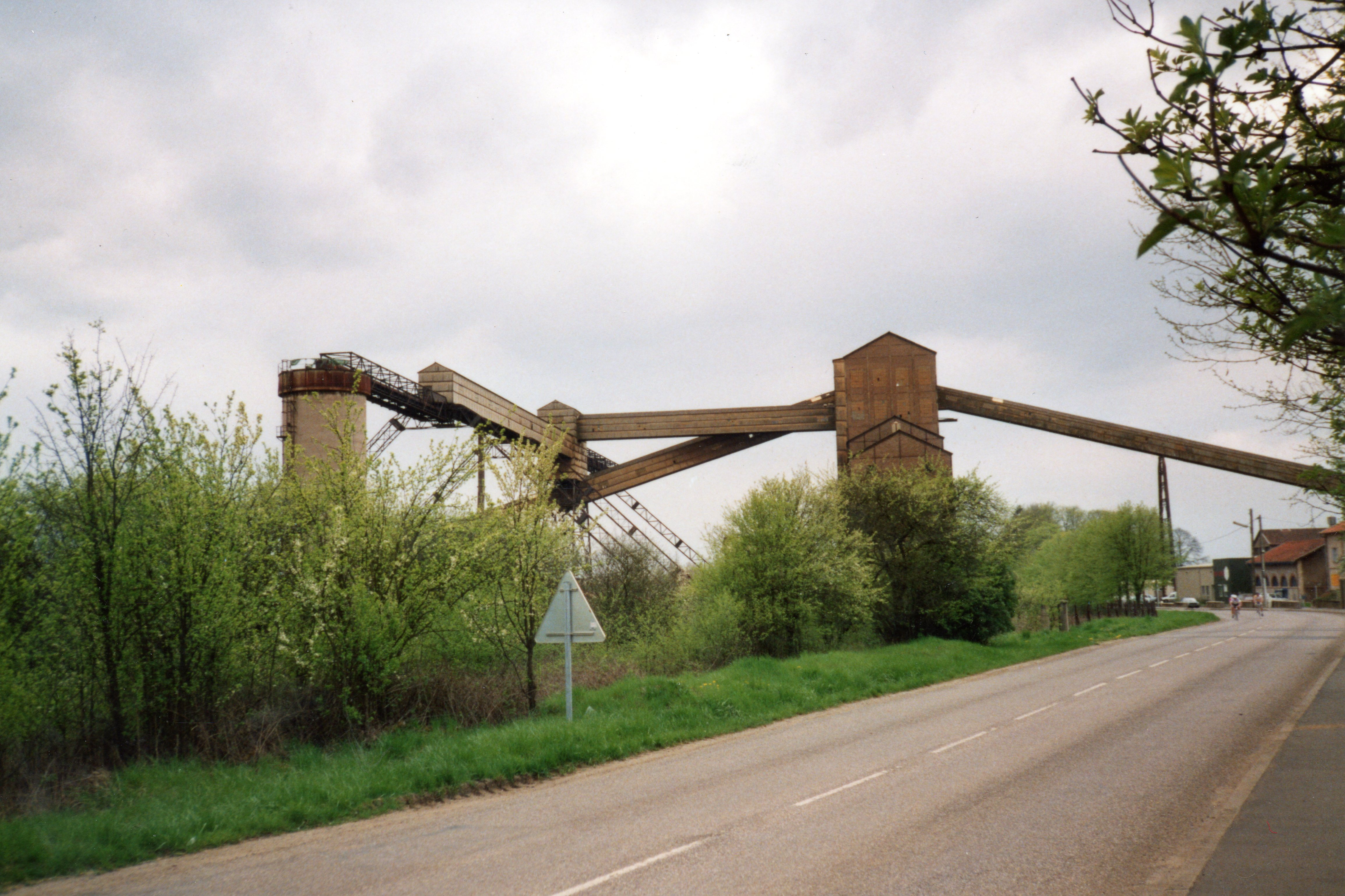 vue du chevalement de la mine de Tucquegnieux avant sa démolition début des années 1990